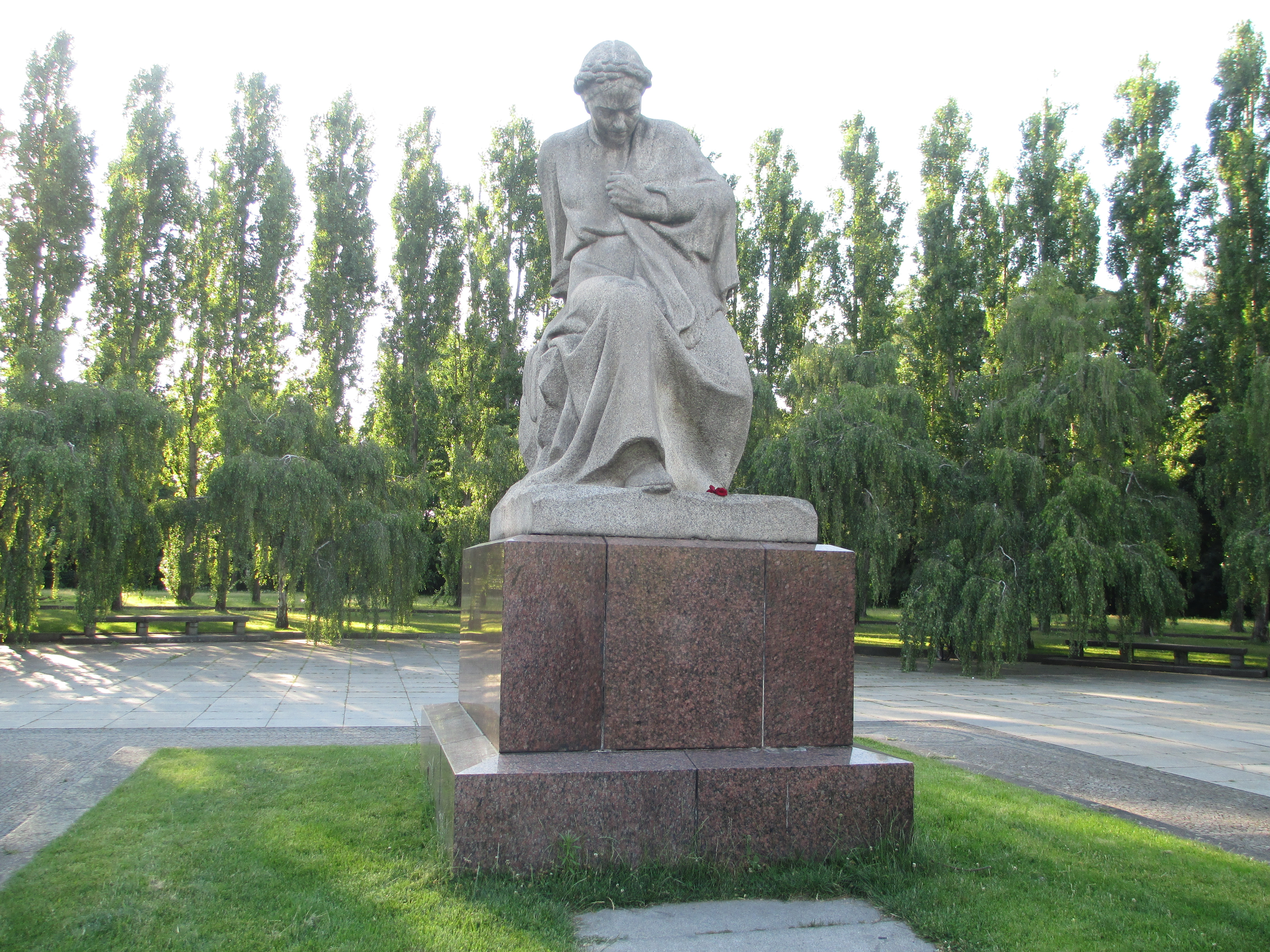 פסל האם באנדרטת המלחמה בפארק טרפטו בברלין